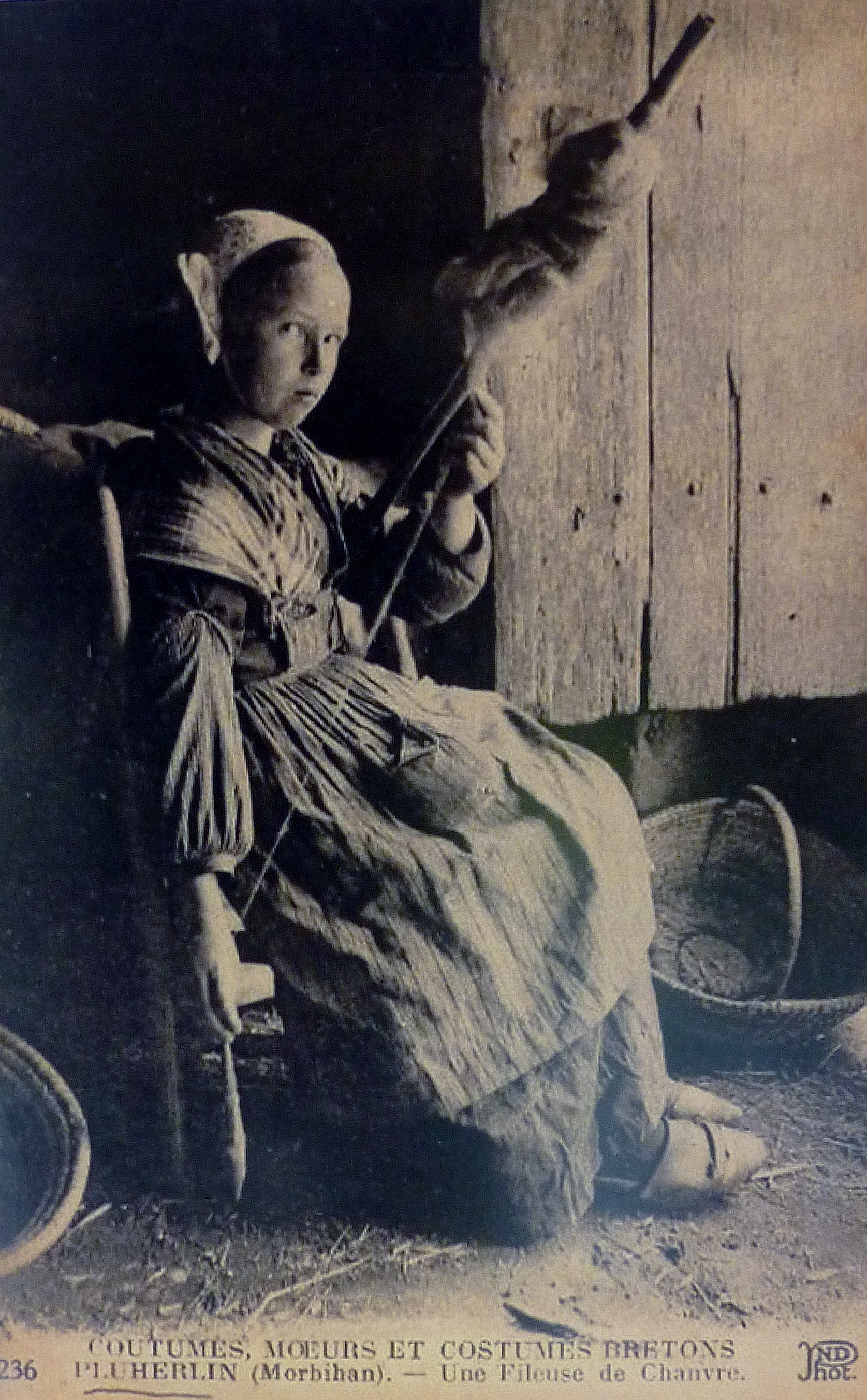 Fileuse de chanvre à Pluherlin au début du XXe siècle (carte postale ND Photo).